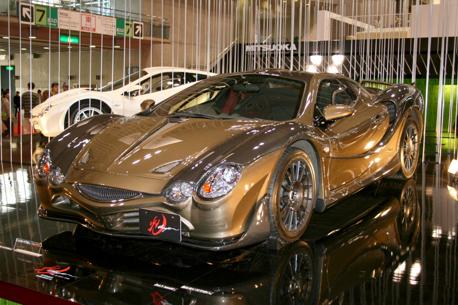 Mituoka Orochi Kabuto in Tokyo motor show